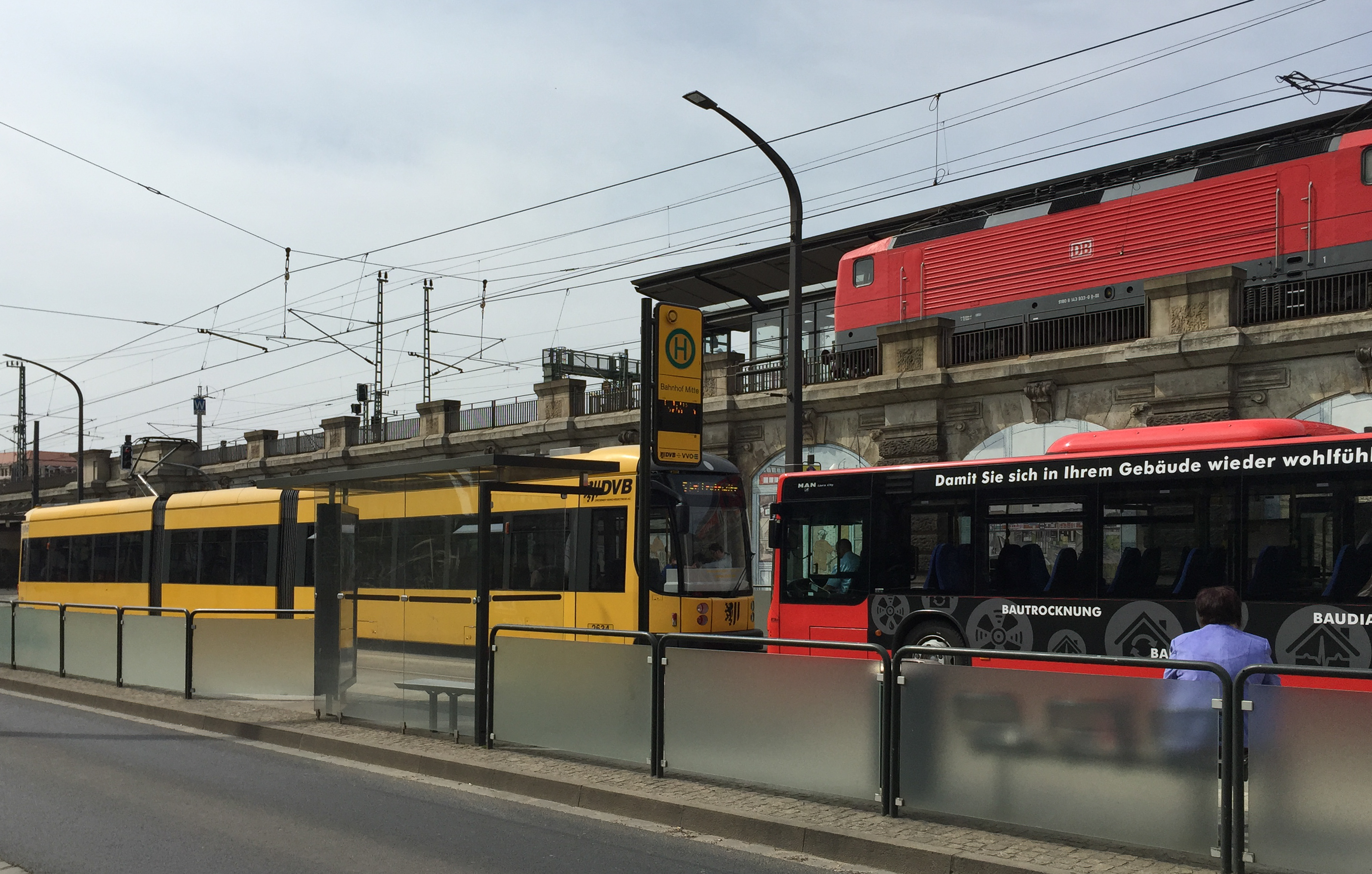 Personenverkehr Bahnhof Mitte Dresden